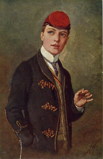 „Im ersten Semester“ (um 1900), Gemälde von Georg Mühlberg (1863-1925), Rechte abgelaufen. Dargestellt ist ein junges Mitglied (Fuchs) einer Studentenverbindung in Couleur, mit Band, rotem Stürmer und lässig geöffneter Kneipjacke.